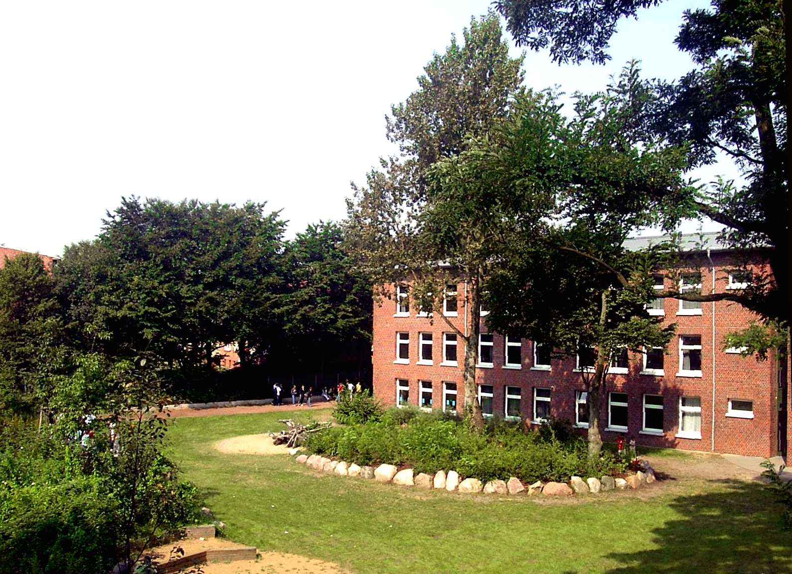 Stadtteilschule Bahrenfeld in Hamburg-Bahrenfeld (Teil des Schulgeländes mit Haus 8)